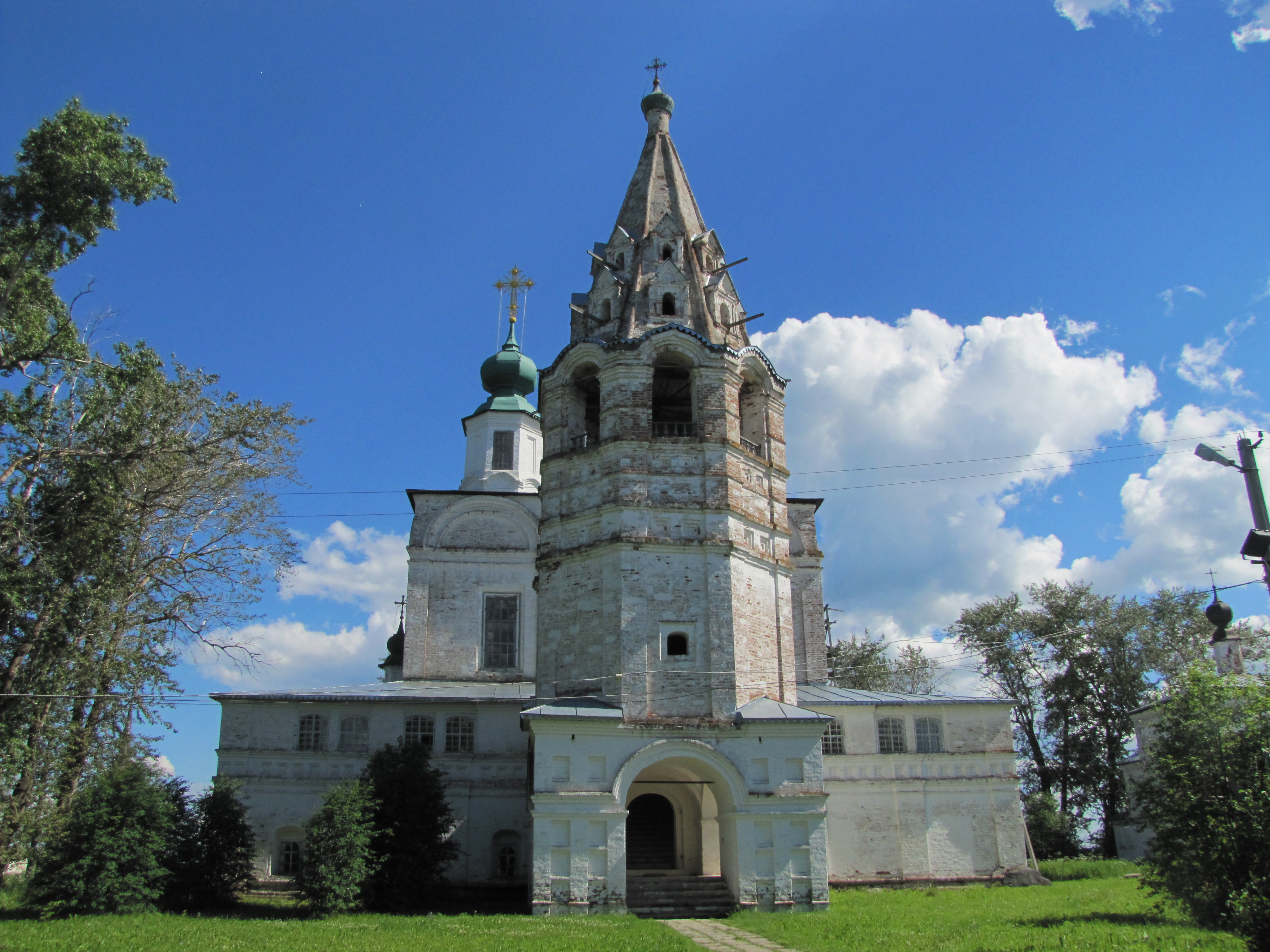 Собор Троицкий: Морозовица, Великоустюгский район, Вологодская область